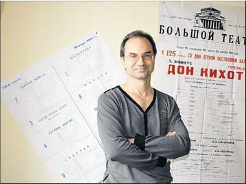 Dmitry Peregudov bei der Eröffnung seiner Tanzschule Schönebeck in 2010